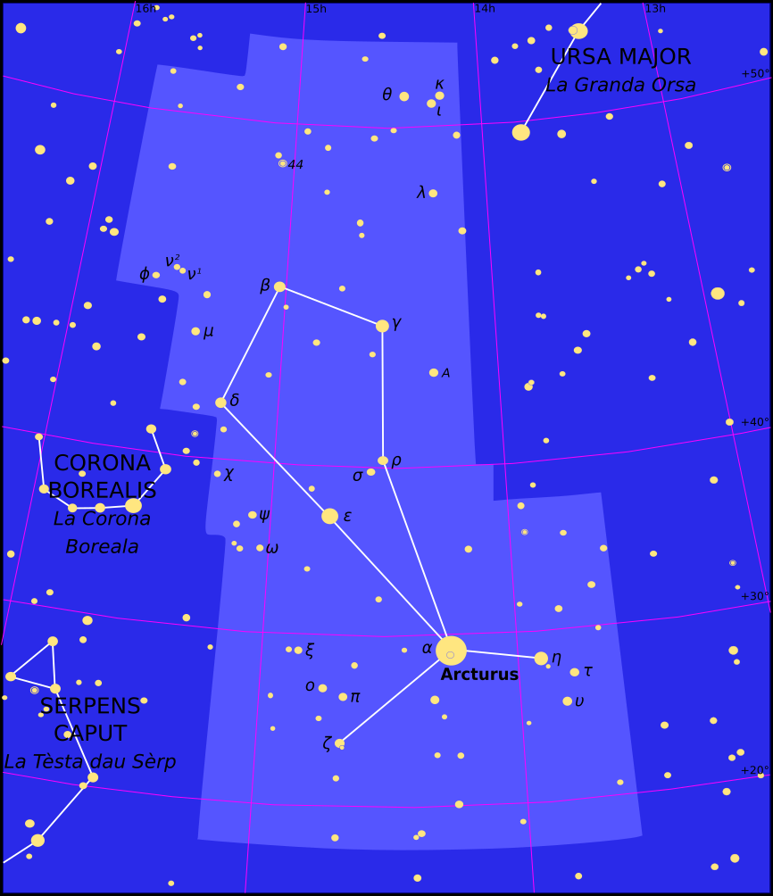 Constellacion dau Boièr.